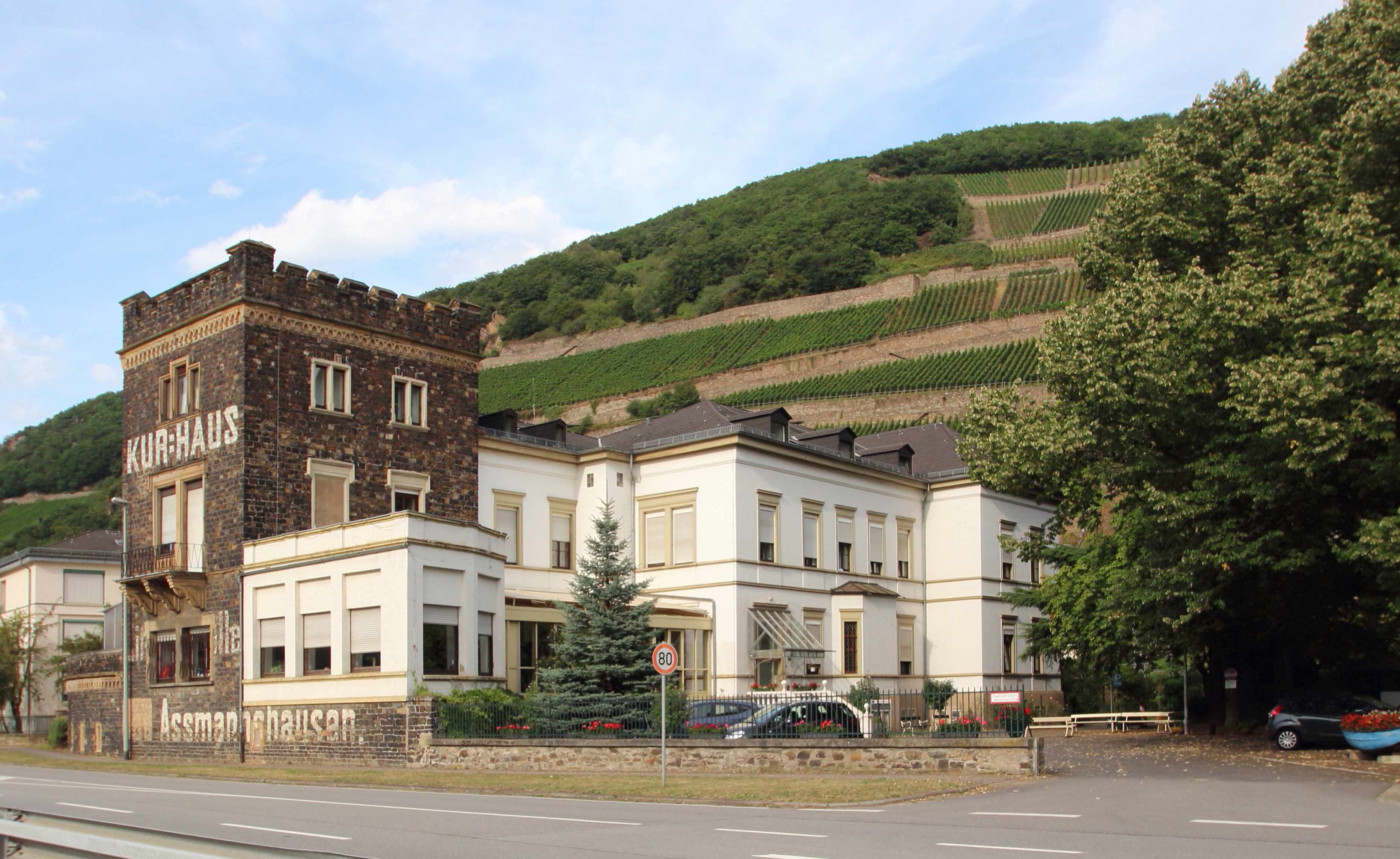 Ehemaliges Kurhaus von Assmannshausen, erbaut um 1872-74. Bauherr: Oberlandesgerichtsrat Augustin. Das Turmgebäude im Burgenstil liegt über der Fassung einer warmen Lithium(Lithion)-Quelle (Graf-Adolph-Quelle, später Ass-Quelle). Seit 1950 St. Thomas-Morus-Haus (Alten- und Pfegeheim). Rheinallee 9, Assmannshausen